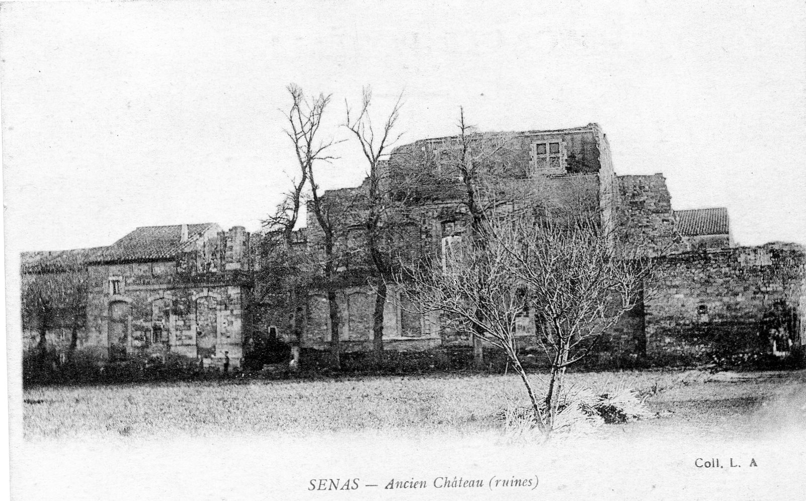 Le château de Sénas a été construit vraisemblablement dans la dernière moitié du XIIe siècle par la famille des Porcelet-Sacristain d’Arles